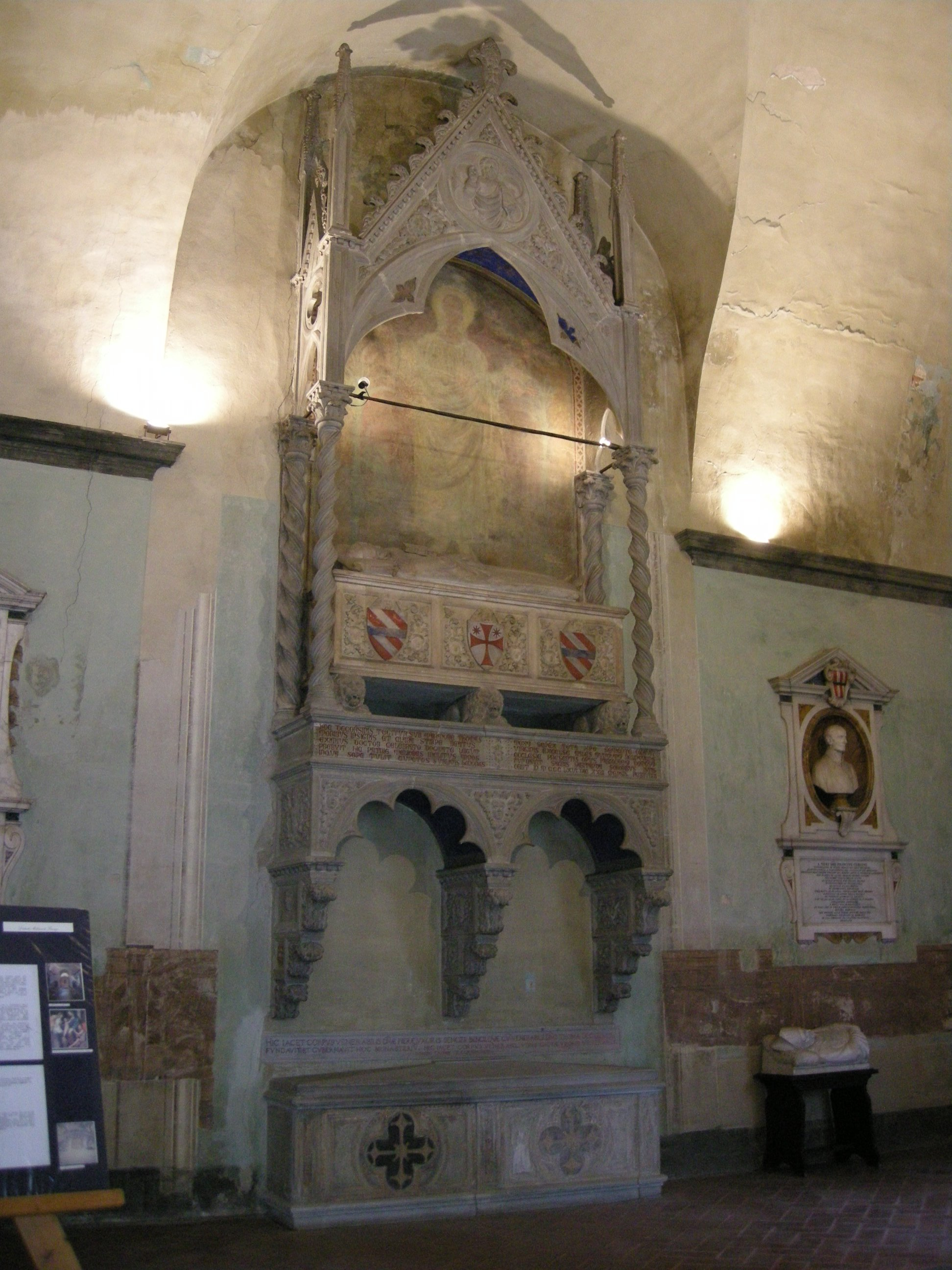 Santo spirito, cappella corsini, tomba di tommaso corsini